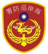 中華民國海巡署軍種臂章